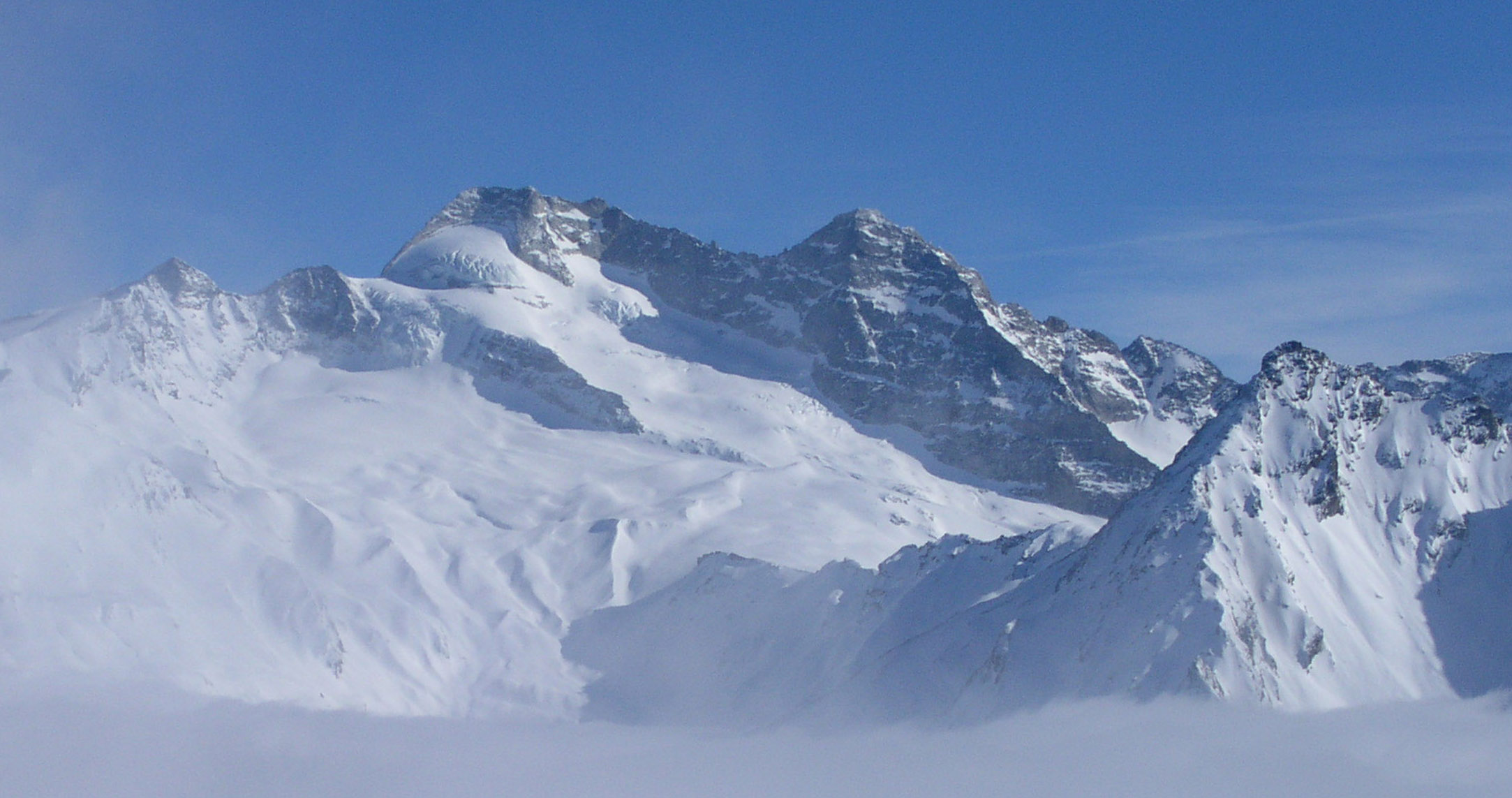 Olperer_nordwest